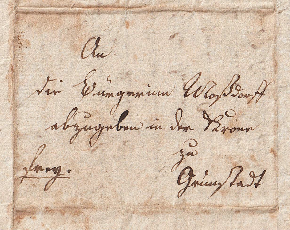 Briefanschrift des Revolutionärs August Moßdorff (1758-1843), an seine Frau in Grünstadt, 1795. Museum im Alten Rathaus Grünstadt.